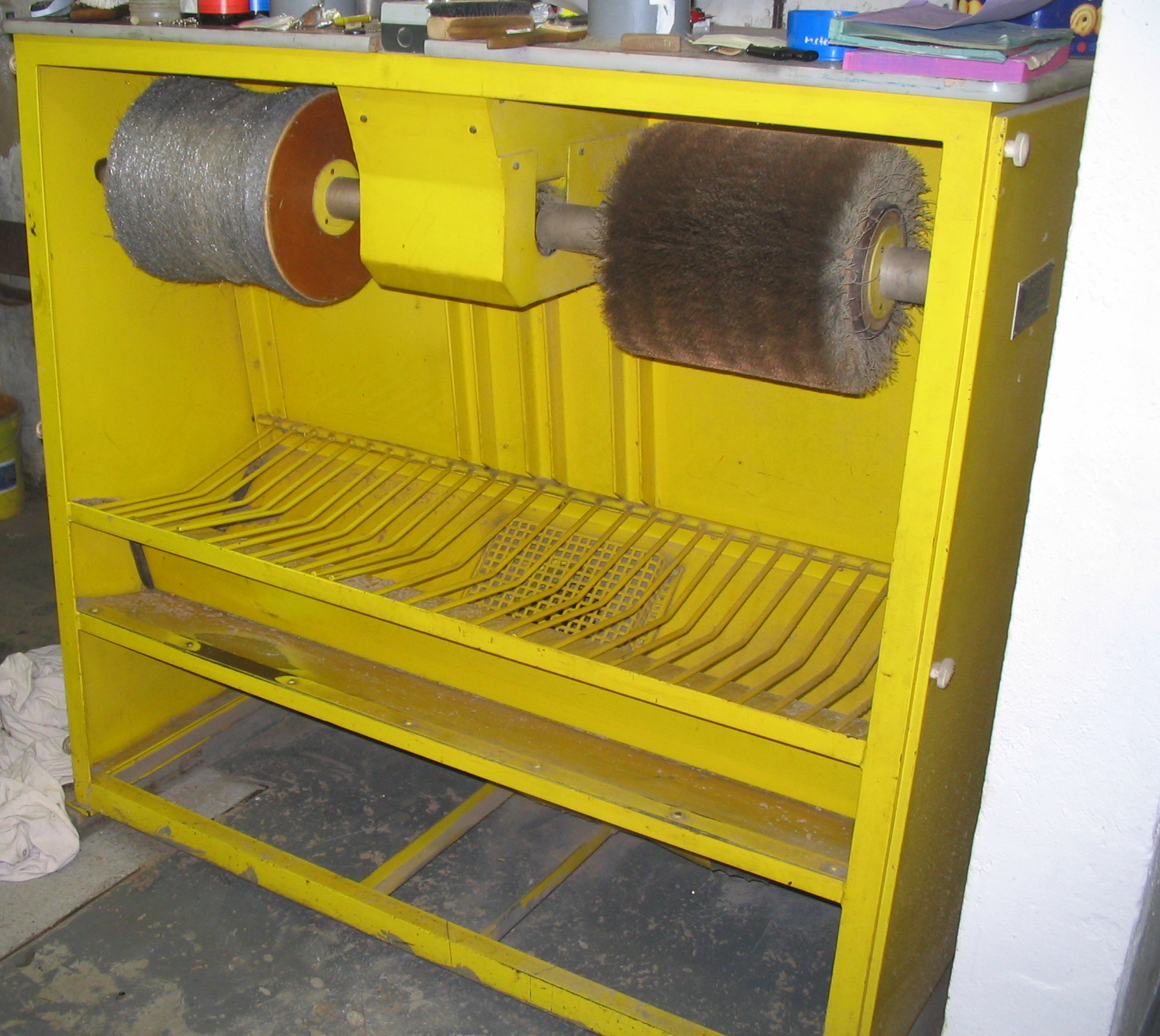 Aufraumaschine, gesehen in der Firma Lederreinigung Dieter, Höninger Weg 107, 50969 Köln-Zollstock Inhaber: Theodoro Saracino. Lederreinigung, Leder-Möbelreinigung, Lederfärberei, Pelzreinigung